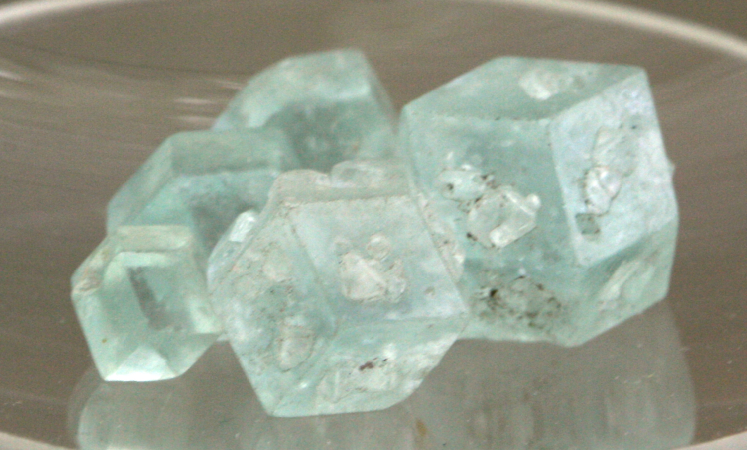 Boracit, Mineralogisches Museum Bonn